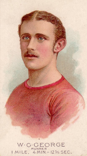 Walter George (1858-1943), athlète britannique spécialiste des courses de fond.